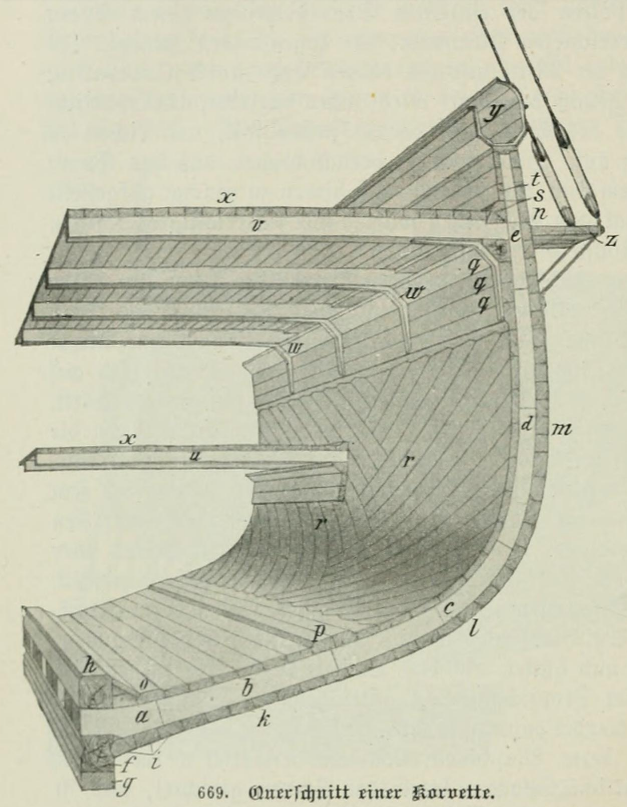 Cubiertas de una corbeta, 1903